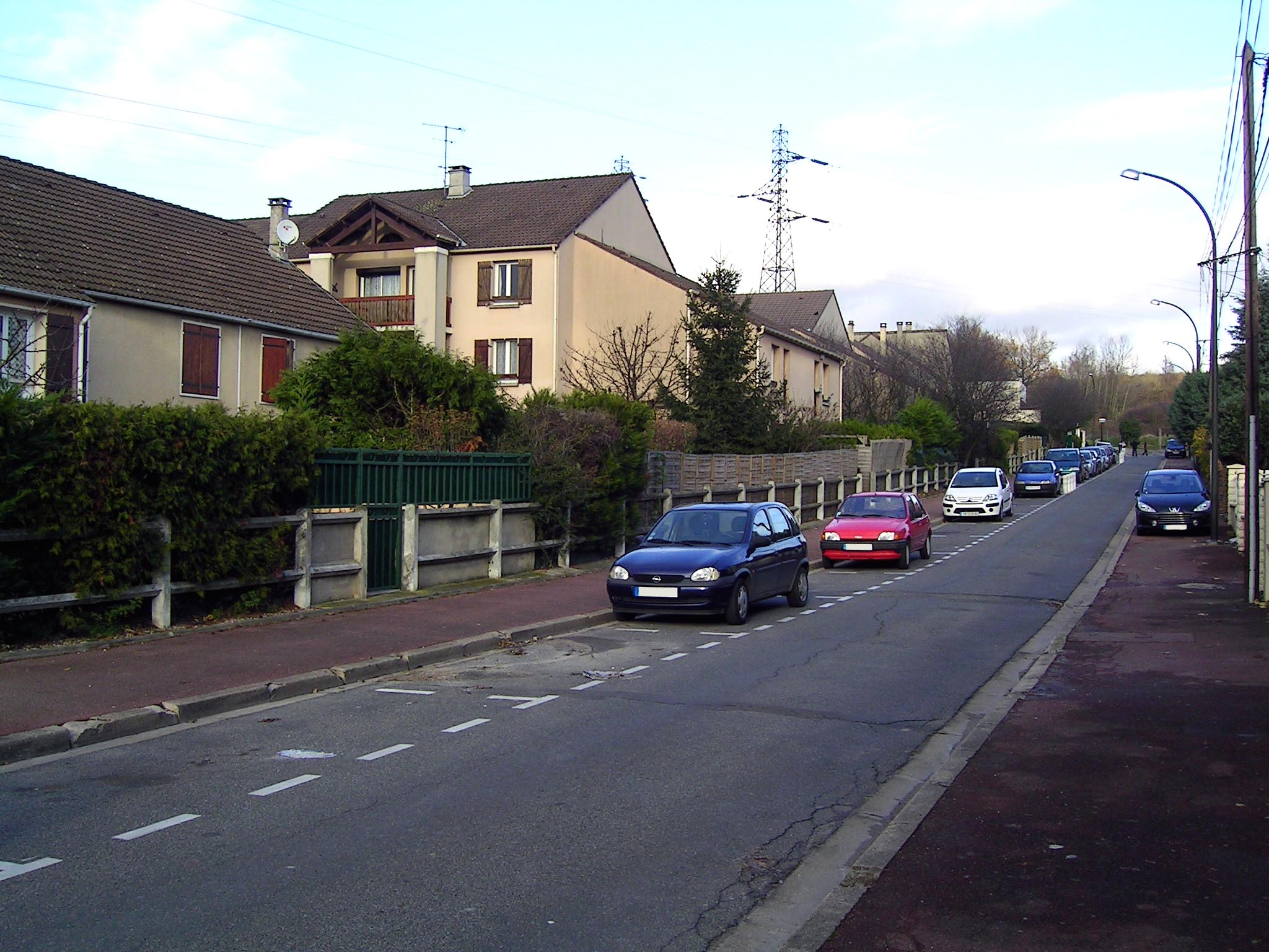 Livry-Gargan (France) - Le quartier Bellevue - Décembre 2006 Photo personnelle (own work) de Marianna